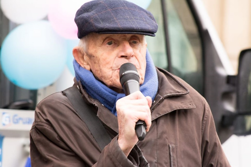 Le docteur Xavier Dor lors d'une manifestation pour la vie, en 2019